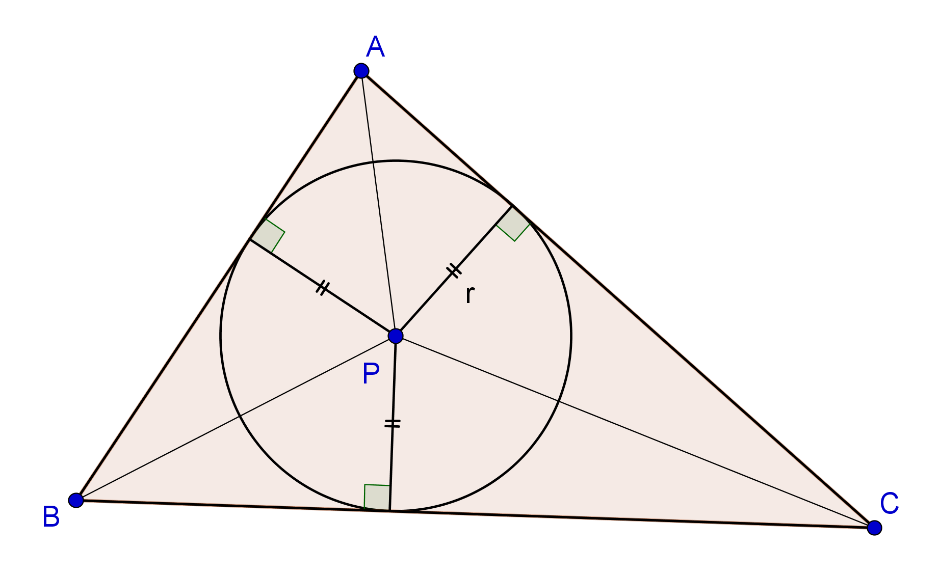 تساعد الصورةعلى اثبات أحد قوانين مساحة المثلث